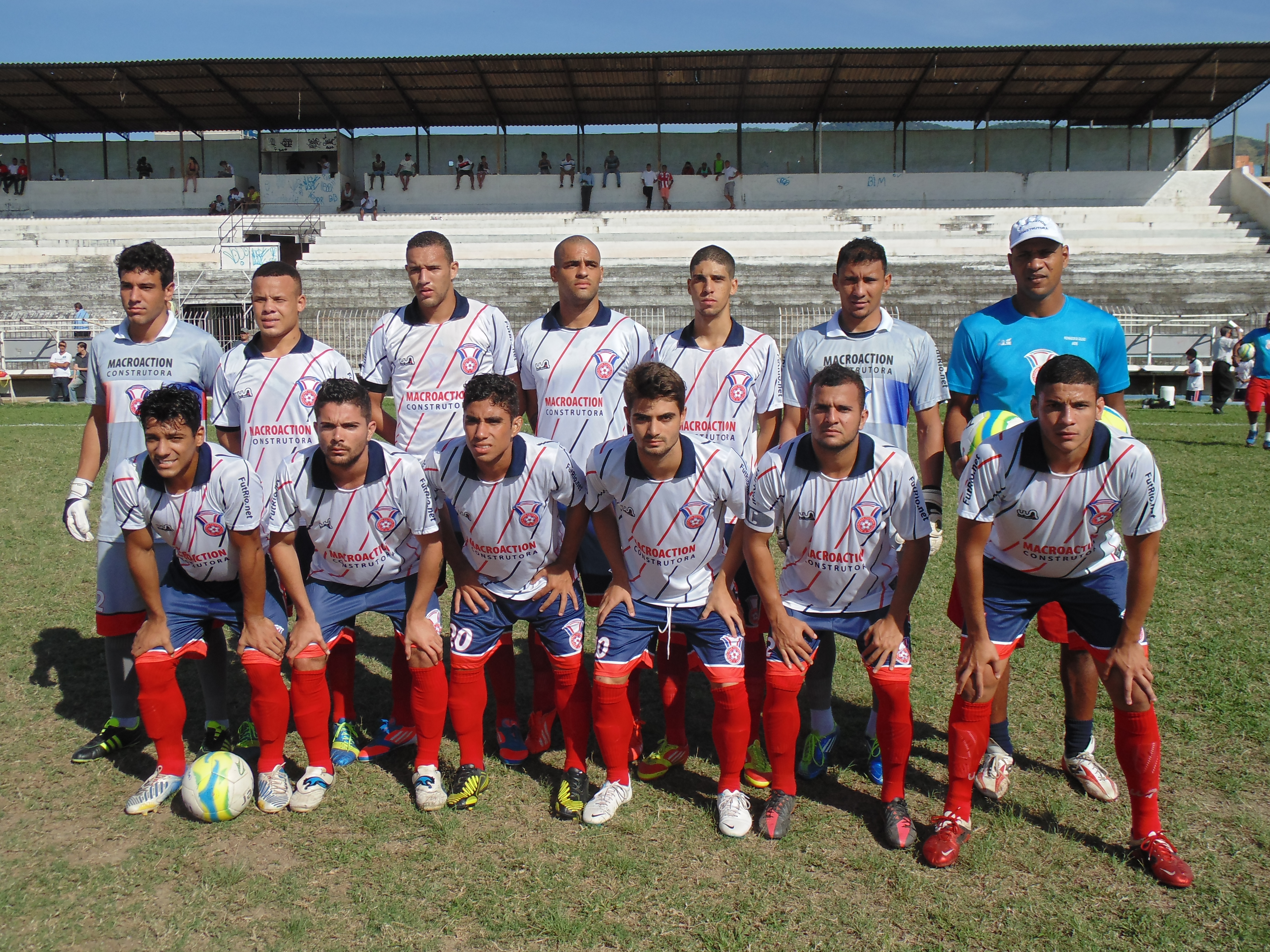 Time do Gonçalense Futebol Clube que disputa a Série C do Rio de Janeiro em 2014. É o antigo Tanguá.